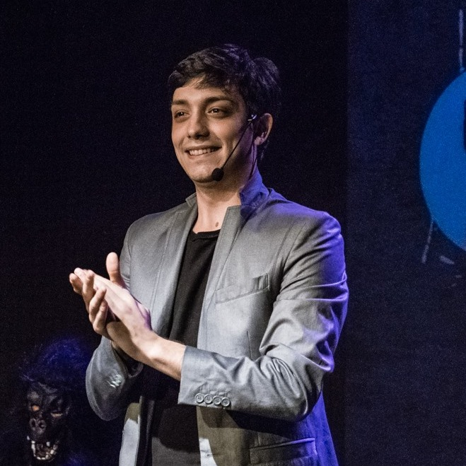 Alessandro Campaiola allo spettacolo teatrale GAFF